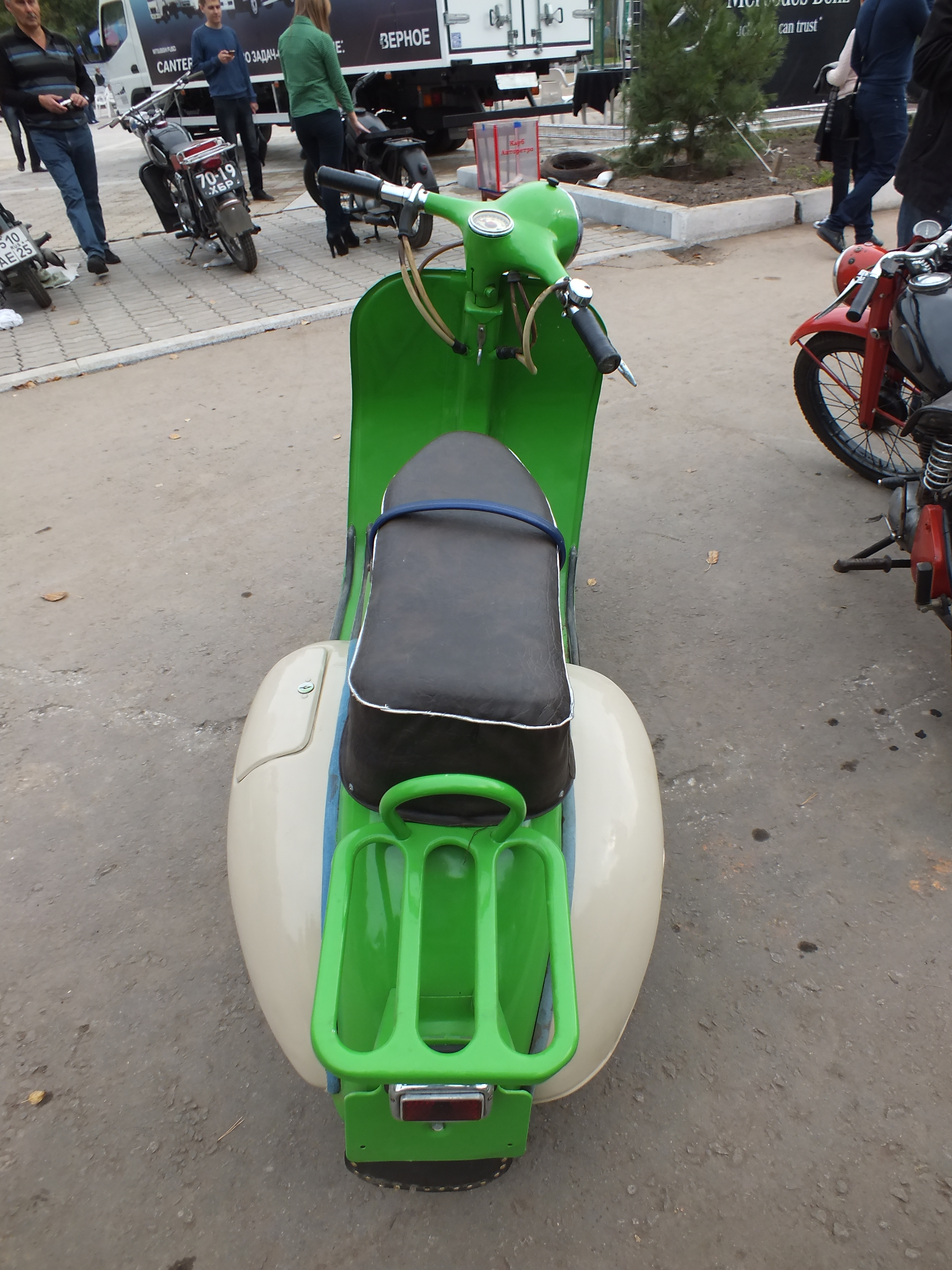 Мотороллер Вятка Хабаровск сентябрь 2016